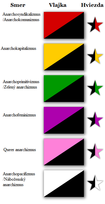 Symboly smerov anarchizmu